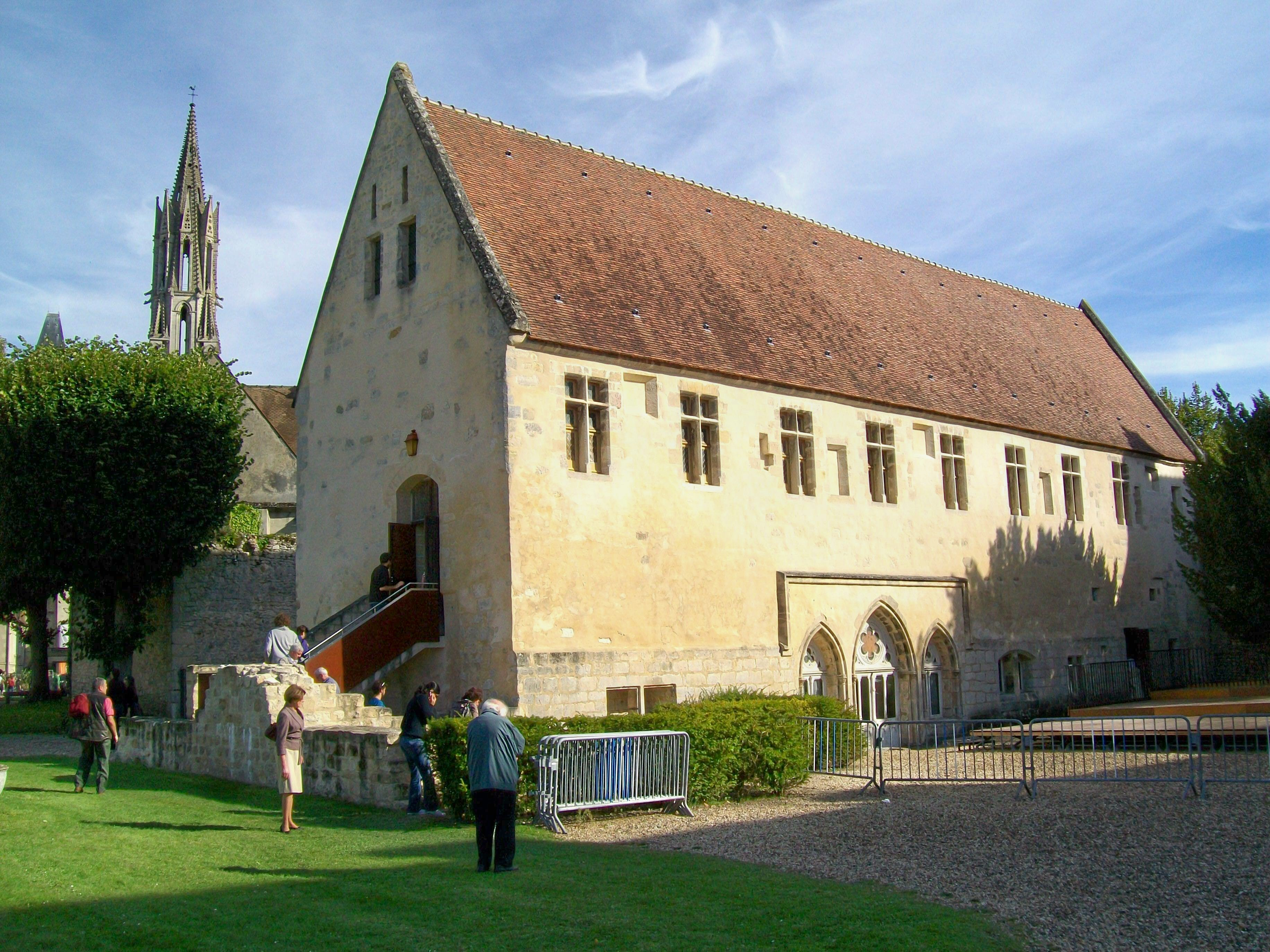 La façade ouest du bâtiment des moines, qui donnait autrefois sur le cloître. L'on voit l'entrée de la salle capitulaire avec ses trois arcades en tiers-point.